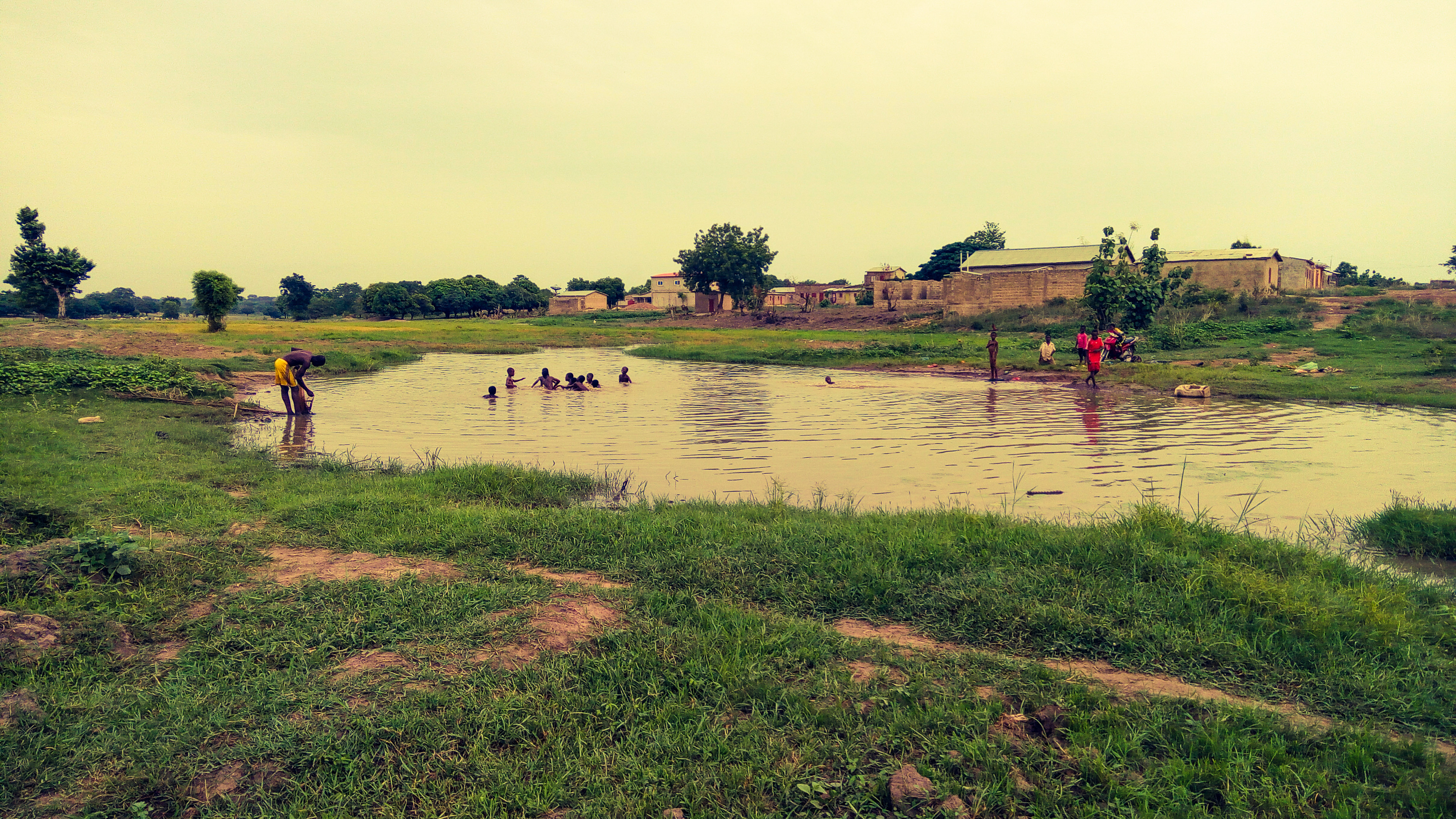 C'est une vue de paysage prise dans un bas-fonds au couché du soleil dans la ville de Parakou au quartier Baka montrant les enfants entrain de pratiquer la natation.